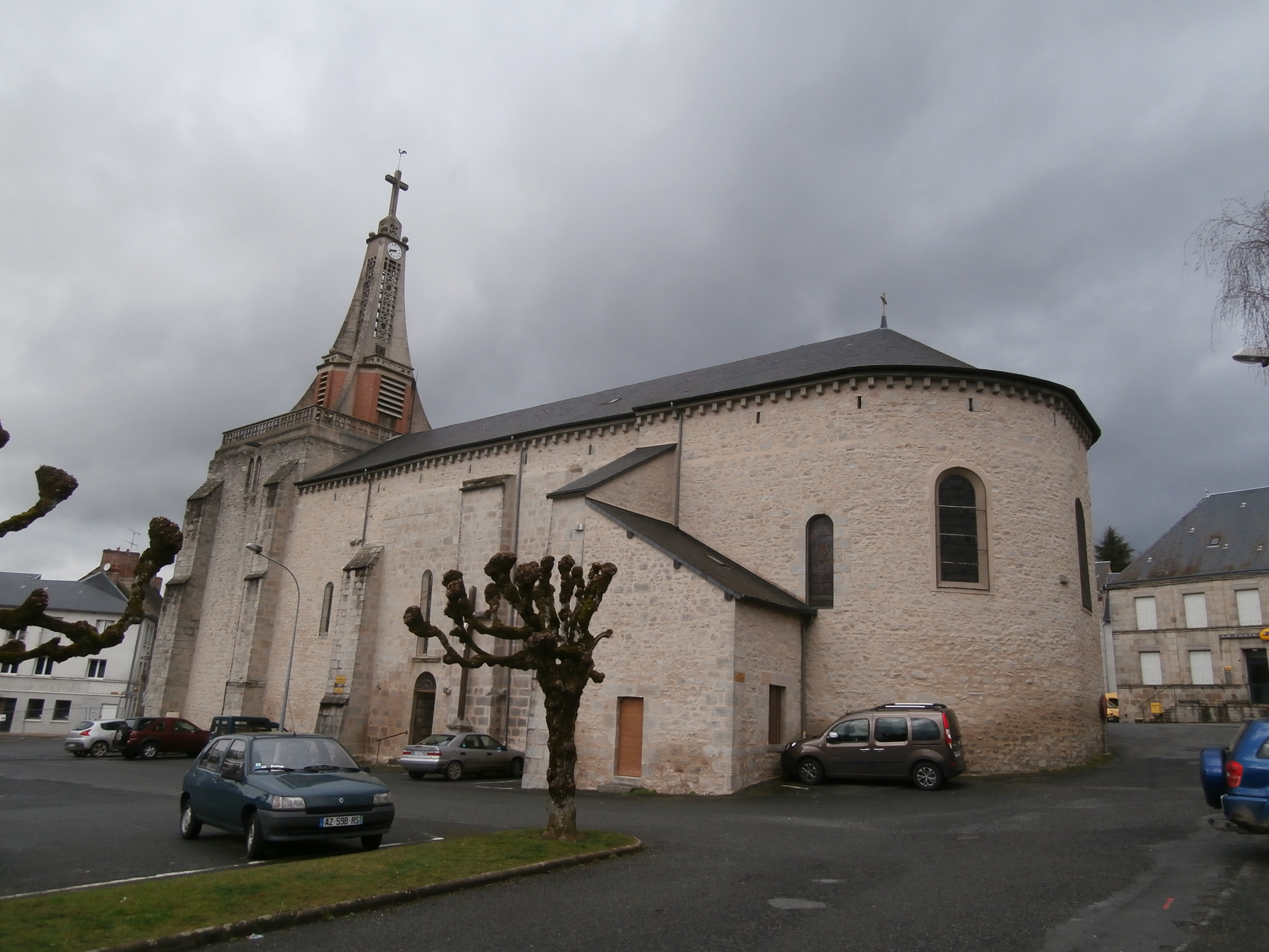 Eglise Saint-Vaury (France)